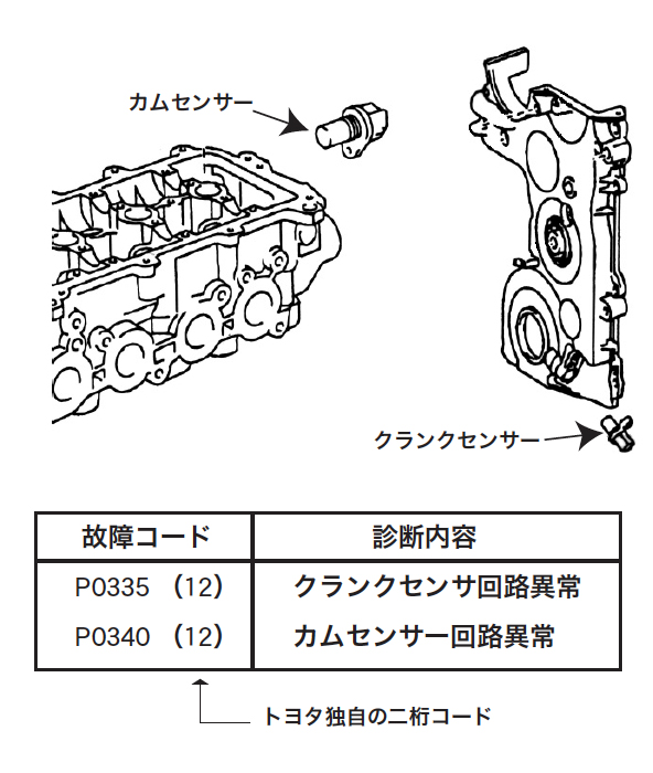 OBD2のメリット説明図